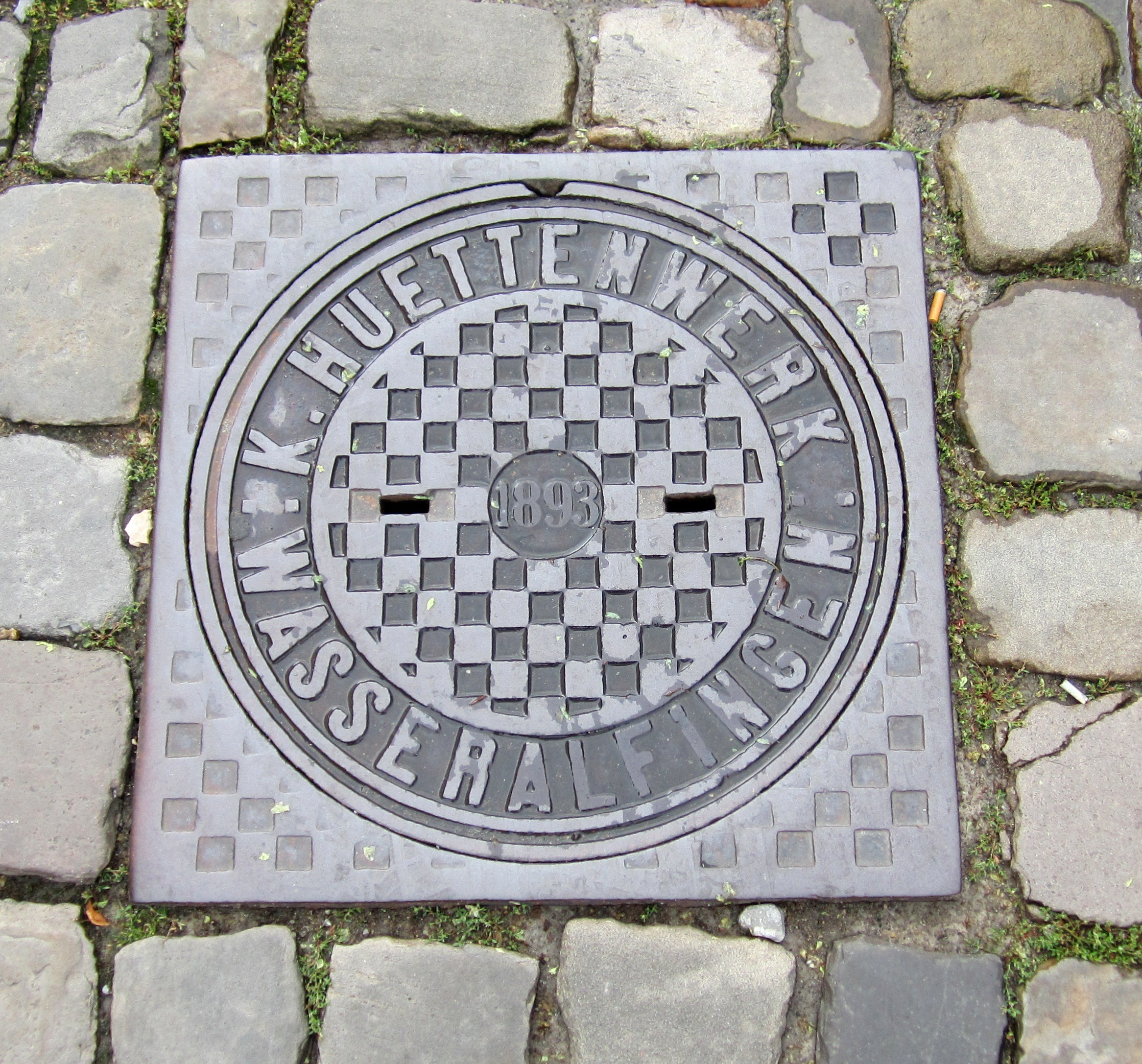 Gusseiserner Kanaldeckel des Königlichen Hüttenwerks Wasseralfingen aus dem Jahr 1893, gefunden in Tübingen